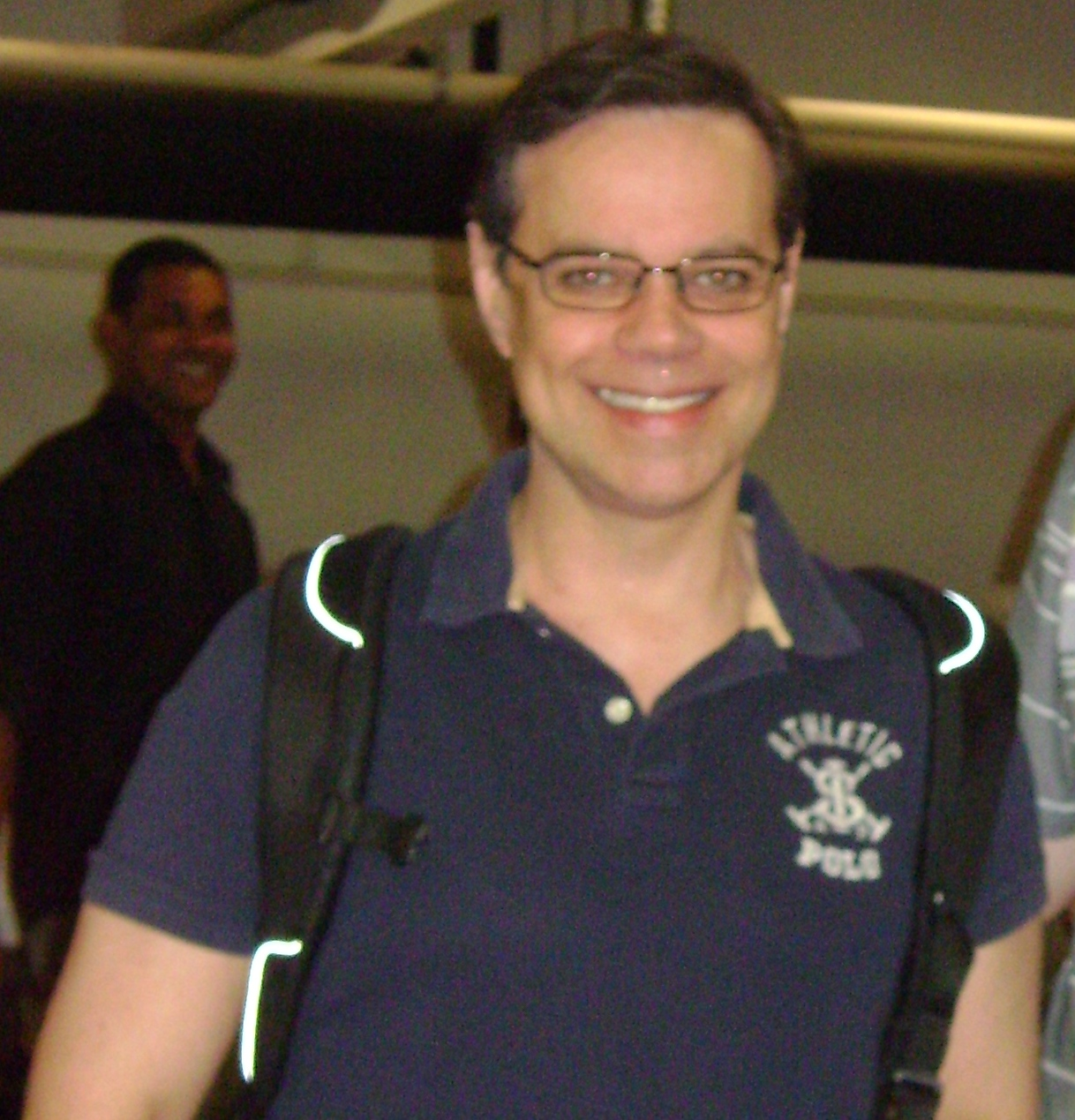 Diogo Vilela, ator brasileiro, após a apresentação do musical "A Gaiola das Loucas", em São Paulo.